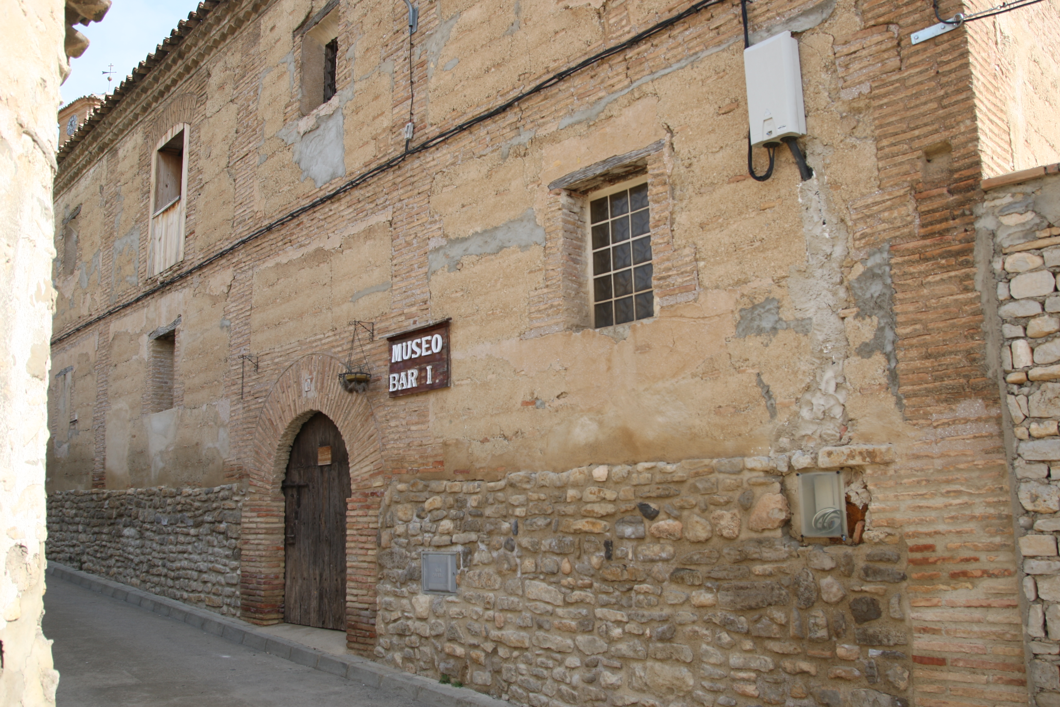 Lanaja